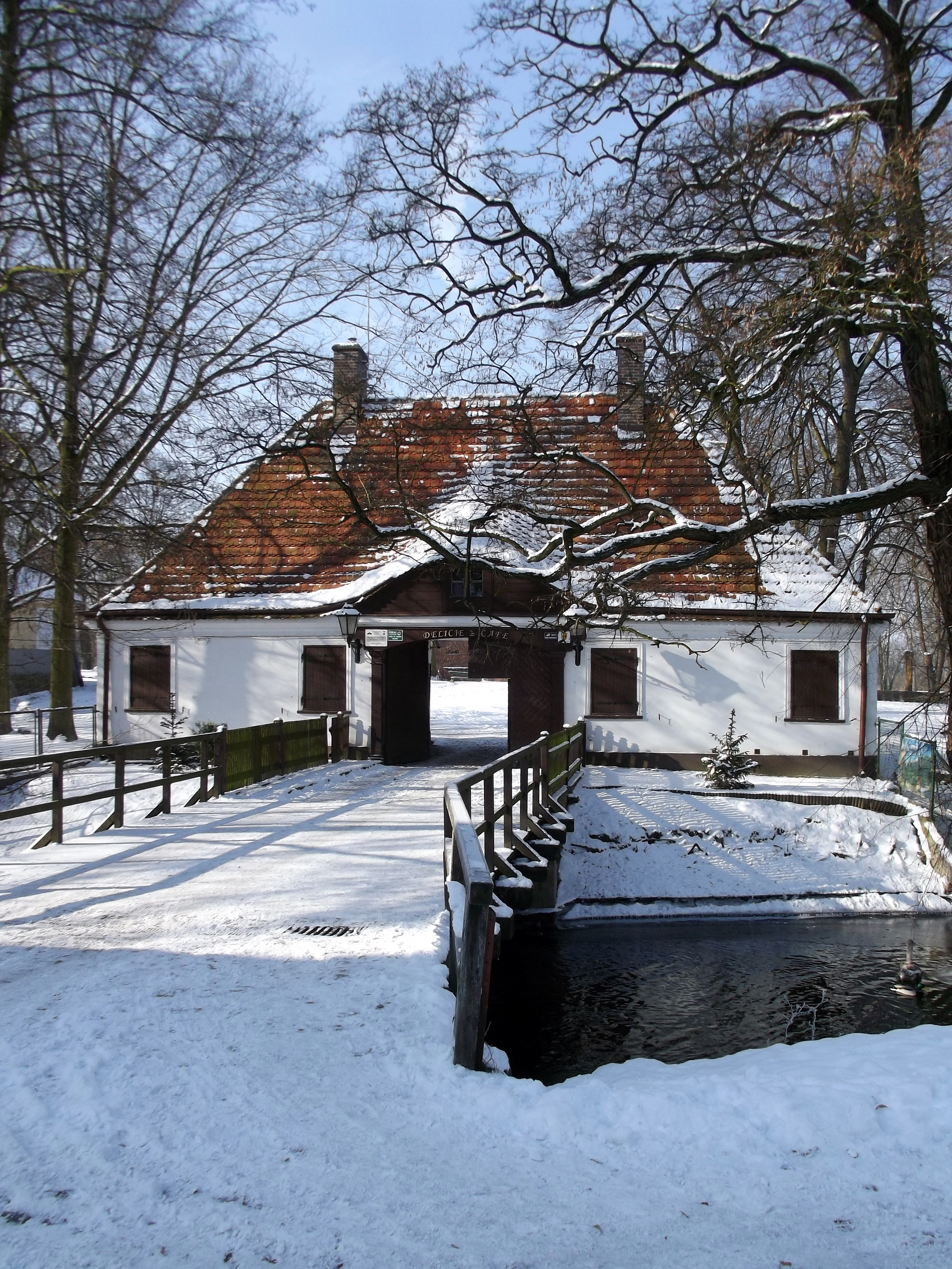 Zrekonstruowany dom bramny prowdzący na teren wyspy grodowej w Międzyrzeczu